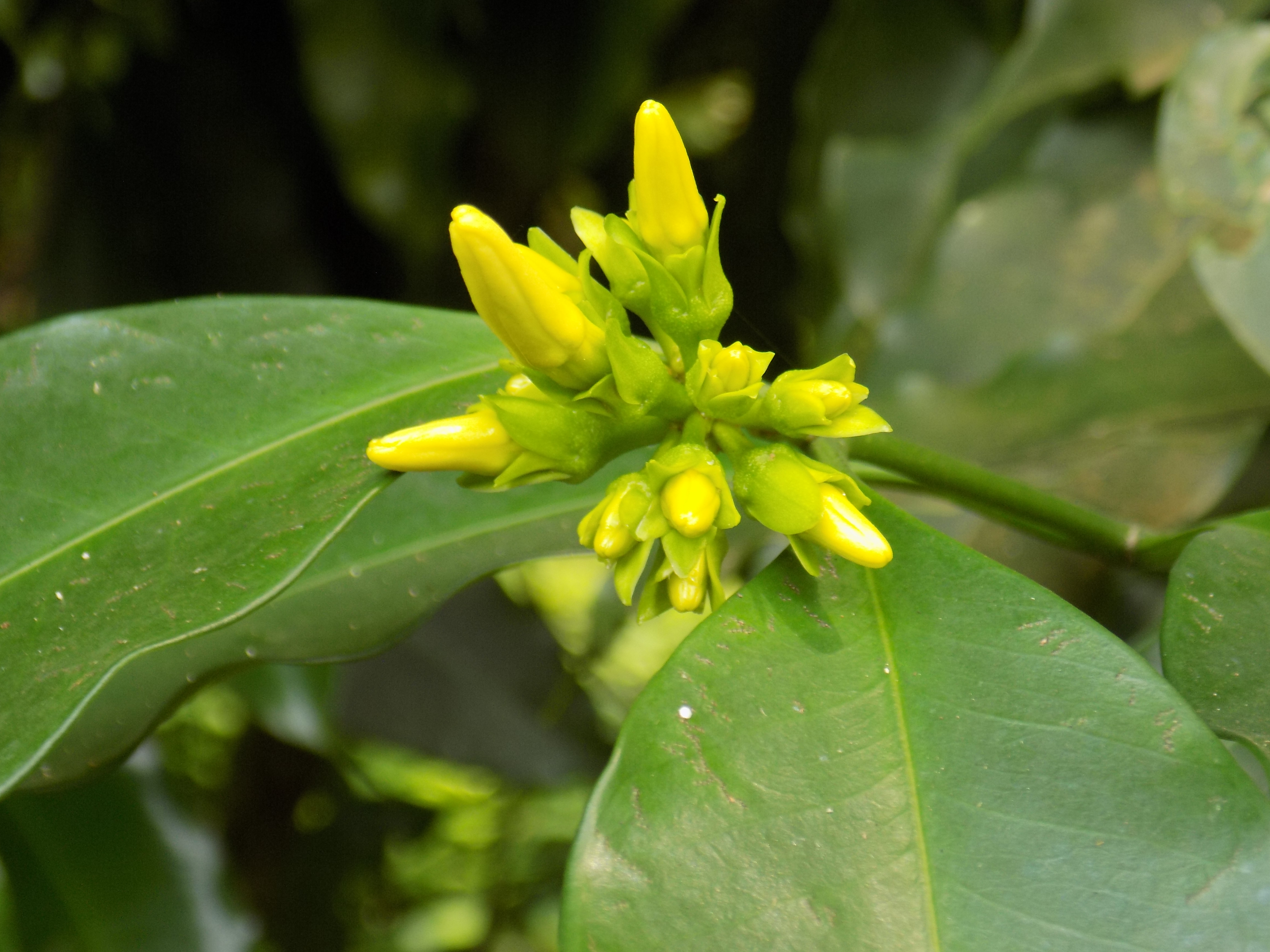 Picralima nitida est une espèce de plantes d'Afrique de l'Ouest du genre Picralima dans la famille des Apocynaceae. Jardin botanique de Limbé, Région du Sud-Ouest, Cameroun